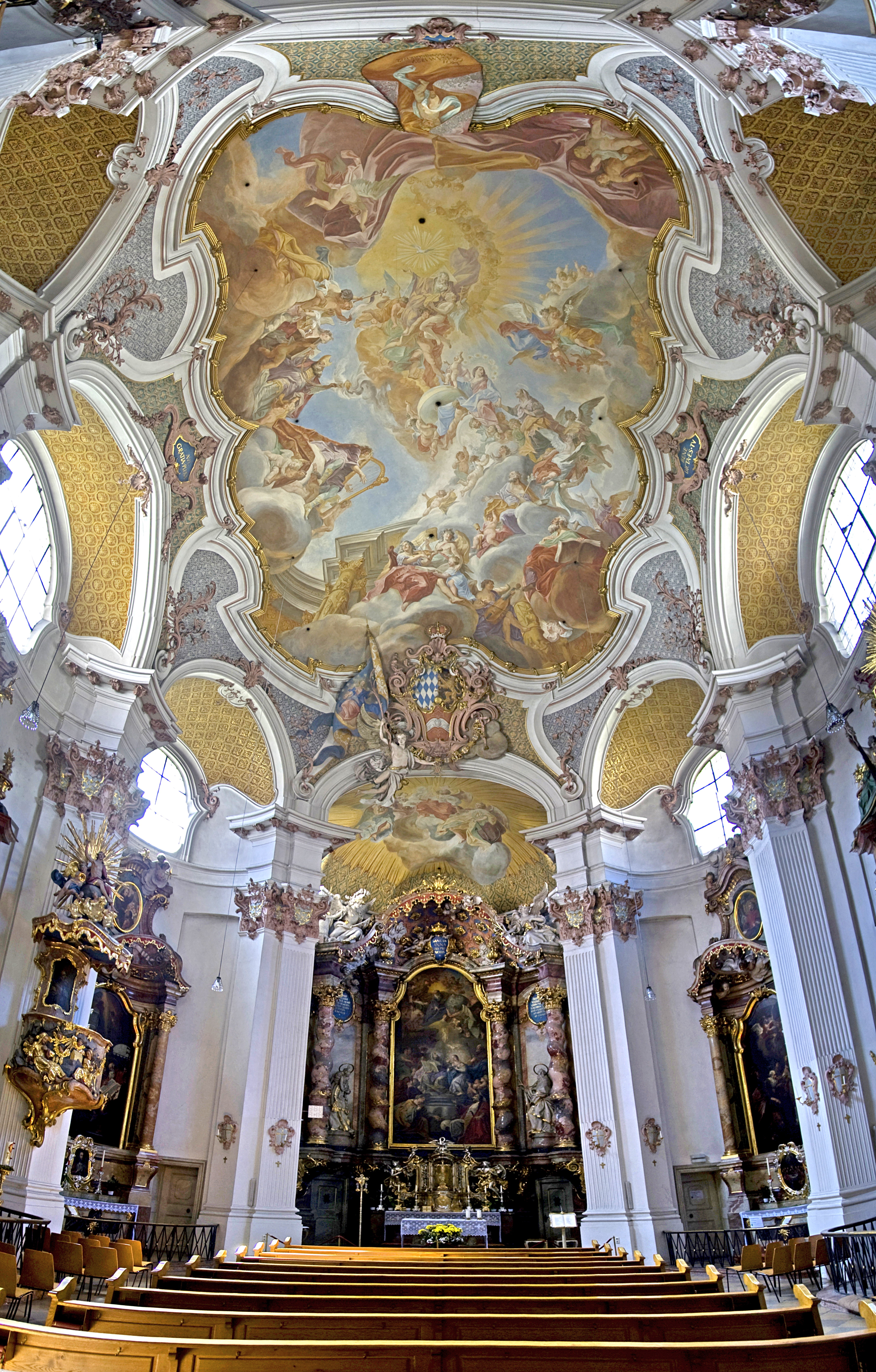 Klosterkirche St. Anna im Lehel - Blick zum Hochaltar und Deckenfresko. Die römisch-katholische Klosterkirche St. Anna im Lehel ist die erste Rokoko-Kirche Altbayerns und prägend für die Entwicklung der Sakralarchitektur in Bayern. Sie befindet sich im Zentrum des Lehel gegenüber der katholischen Pfarrkirche St. Anna im Lehel. Hochaltar- und Deckenfresken von Cosmas Damian Asam.This is a photograph of an architectural monument.